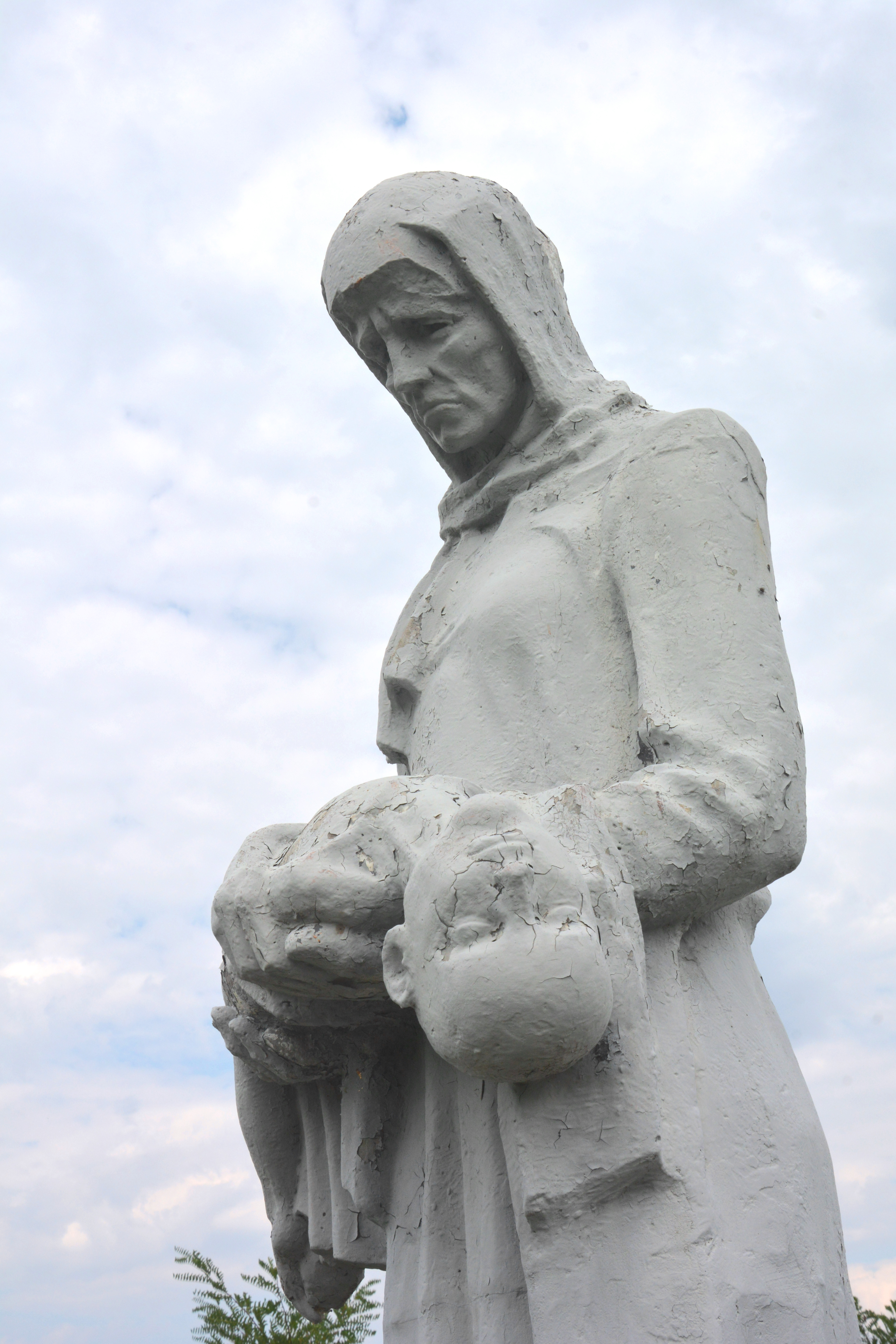 Місце поховання жертв Голодомору 1932 –1933 рр., Велика Багачка смт, центральне кладовище.